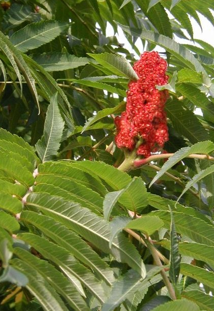 La bildo estas kopiita de da. La originala priskribo estas